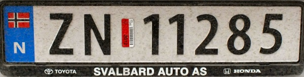 Kjøretøy fra Svalbard i Norge, der den får ordinære, norske skilter. På Svalbard har den samme kombinasjon, men tilsvarende anleggsskilt, gul skrift på sort bakgrunn.